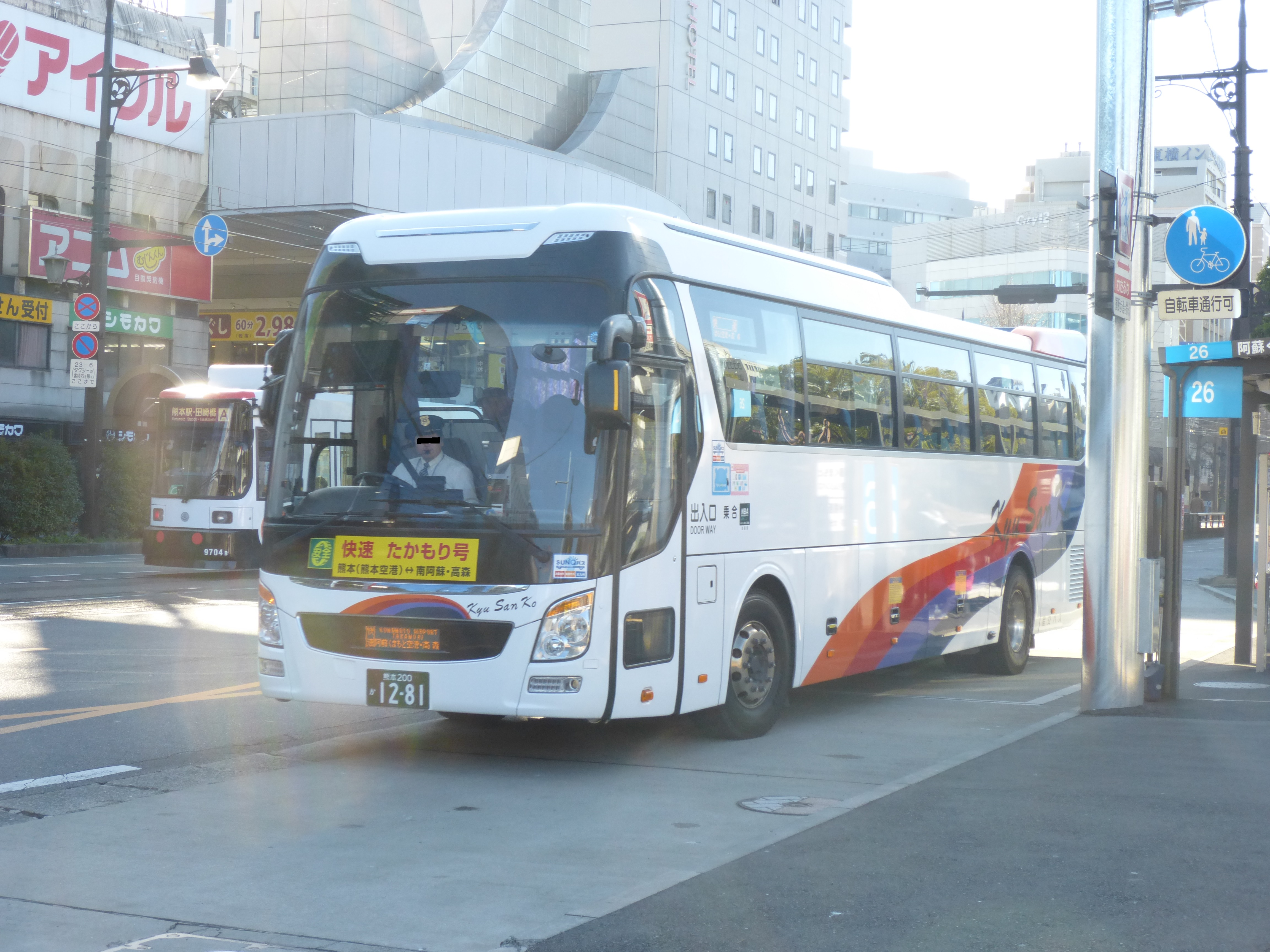 産交バス「たかもり号」専用車、熊本200 か 1281 車種：ヒュンダイユニバース。熊本交通センター仮バスターミナルにて撮影